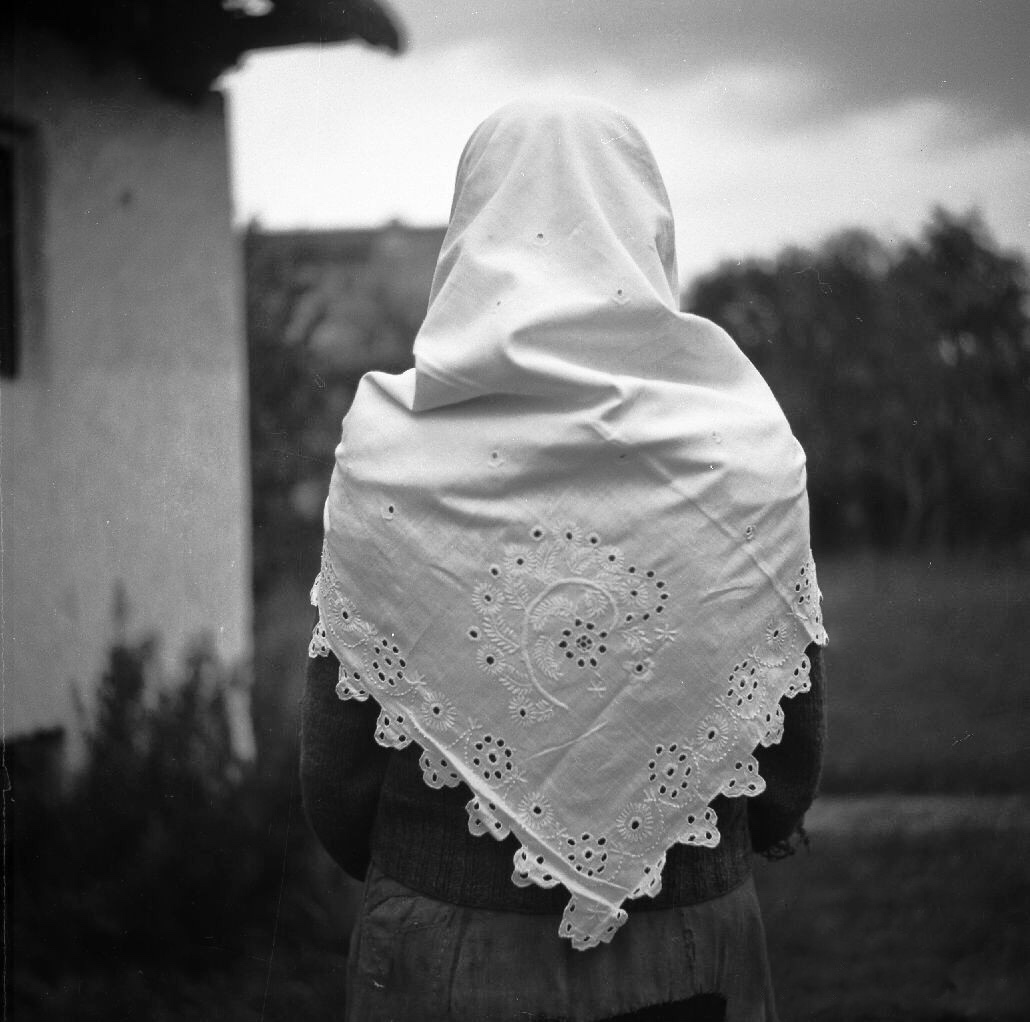 "Ruta" - štikana, 115 x 115 cm. Nosila jo je še stara mati. Dolenje Ravne.